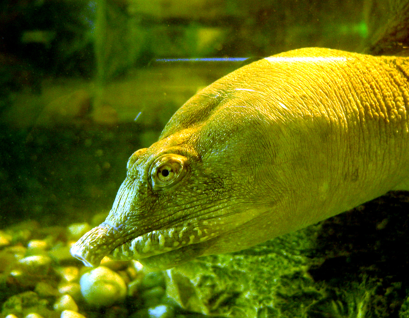 Pelodiscus sinensis Żółwiak chiński